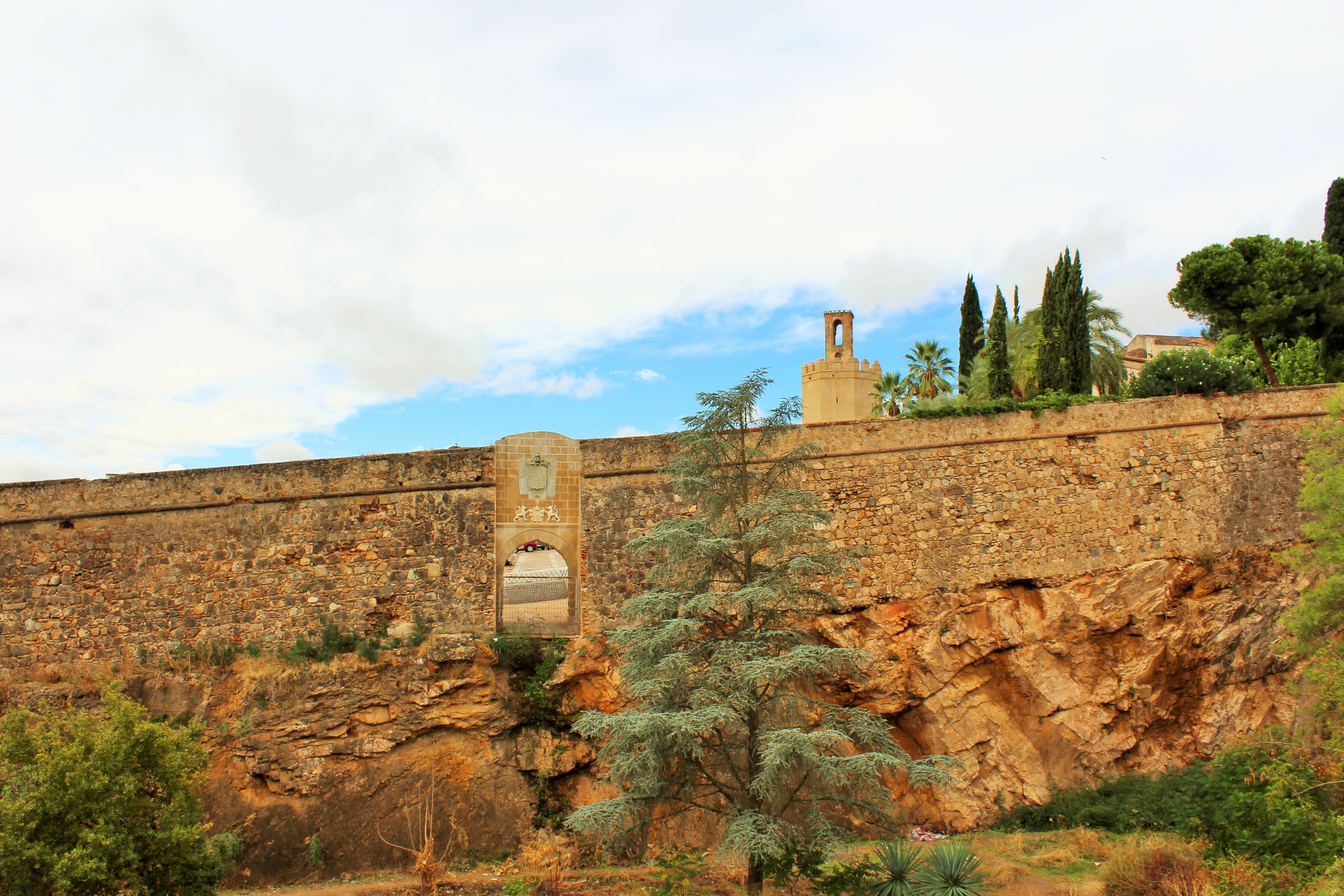 Lienzo este con la puerta de Mérida y Torre de Espantaperros al fondo.